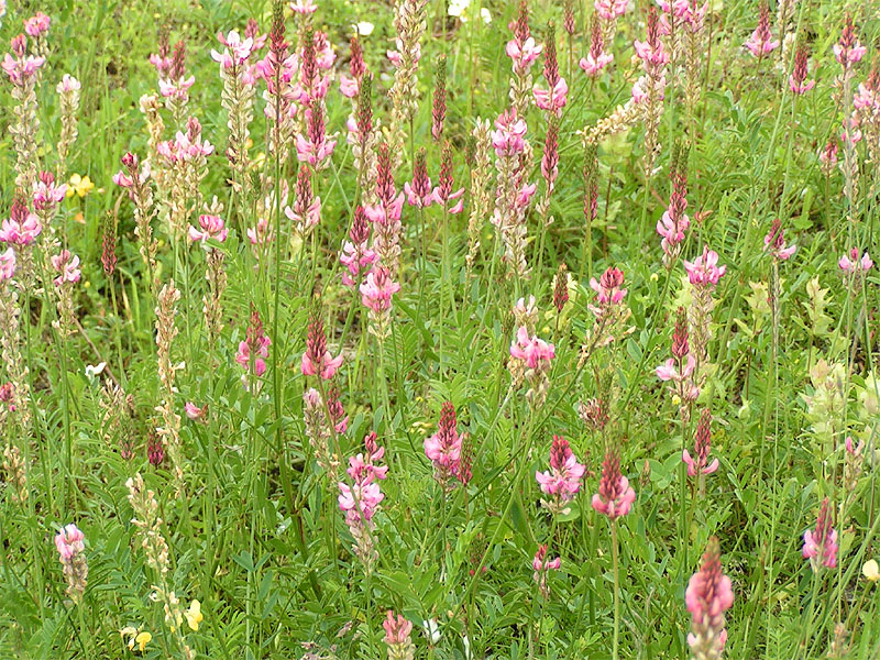 Onobrychis viciifolia; de: Saat-Esparsette